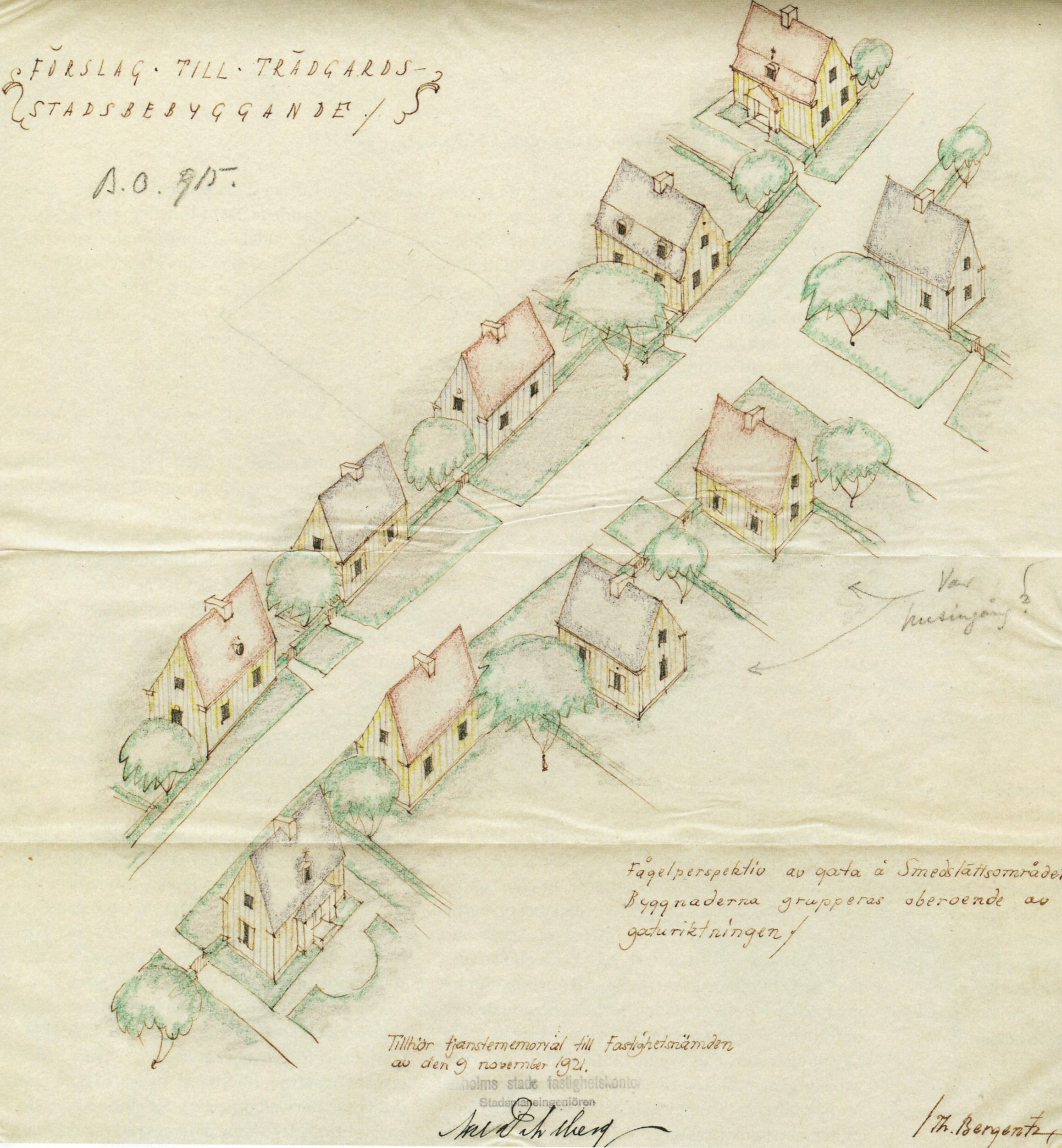 Förslag till trädgårdsstadsbyggande i Smedslätten 9 november 1921."Fågelperspektiv av gata å Smedslättsområdet. Byggnaderna grupperas oberoende av gaturiktningen." "Tillhör tjänstememorial till Fastighetsnämnden av den 9 november 1921." Undertecknat Stockholms stads fastighetskontor, Stadsplaneingenjören Axel Dahlberg / Thure Bergentz.